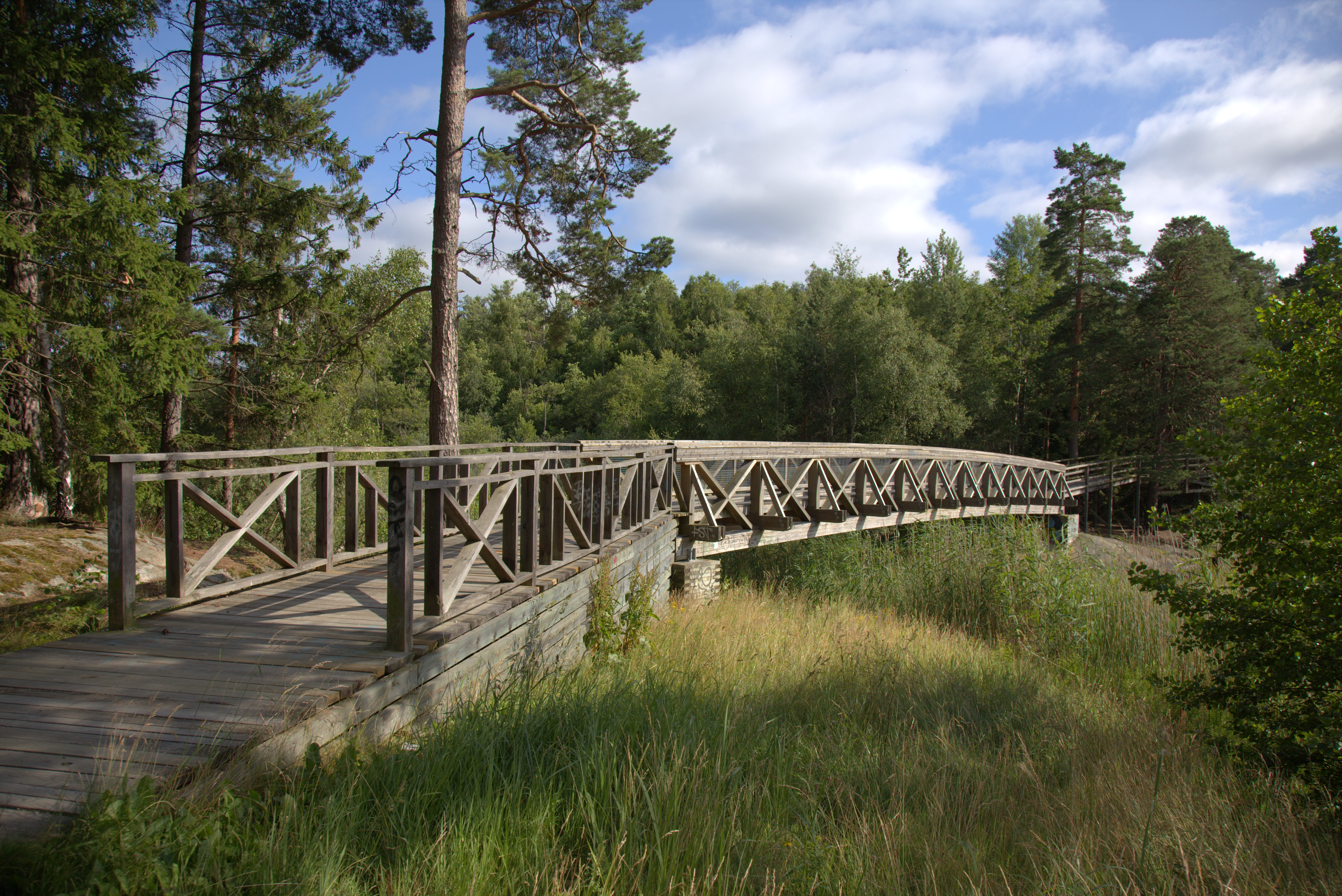 Bron över sundet i Ösbyträsk.